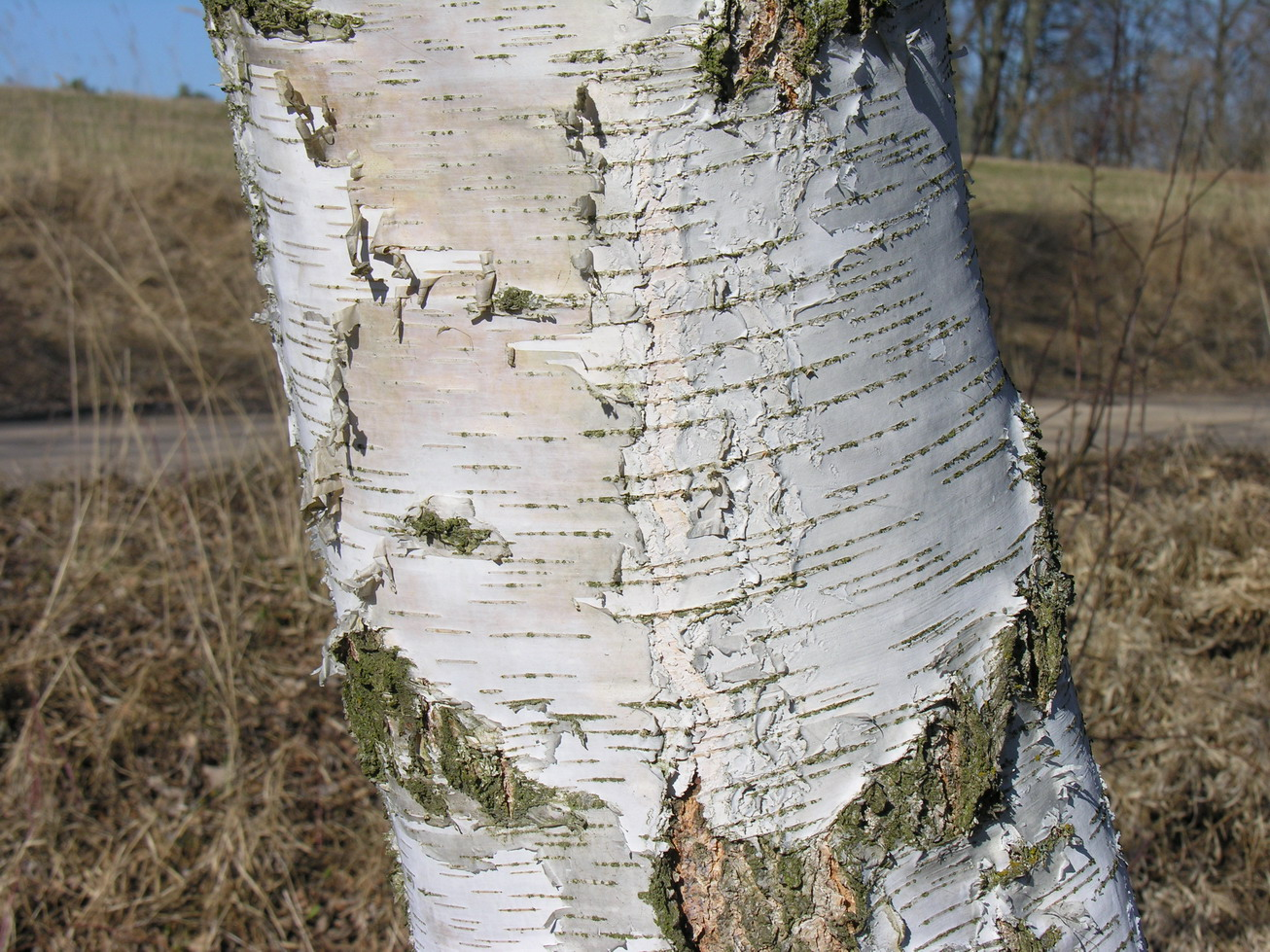 Beržo tošis Fotografavo: Algirdas, 2006 m. balandžio 23 d.